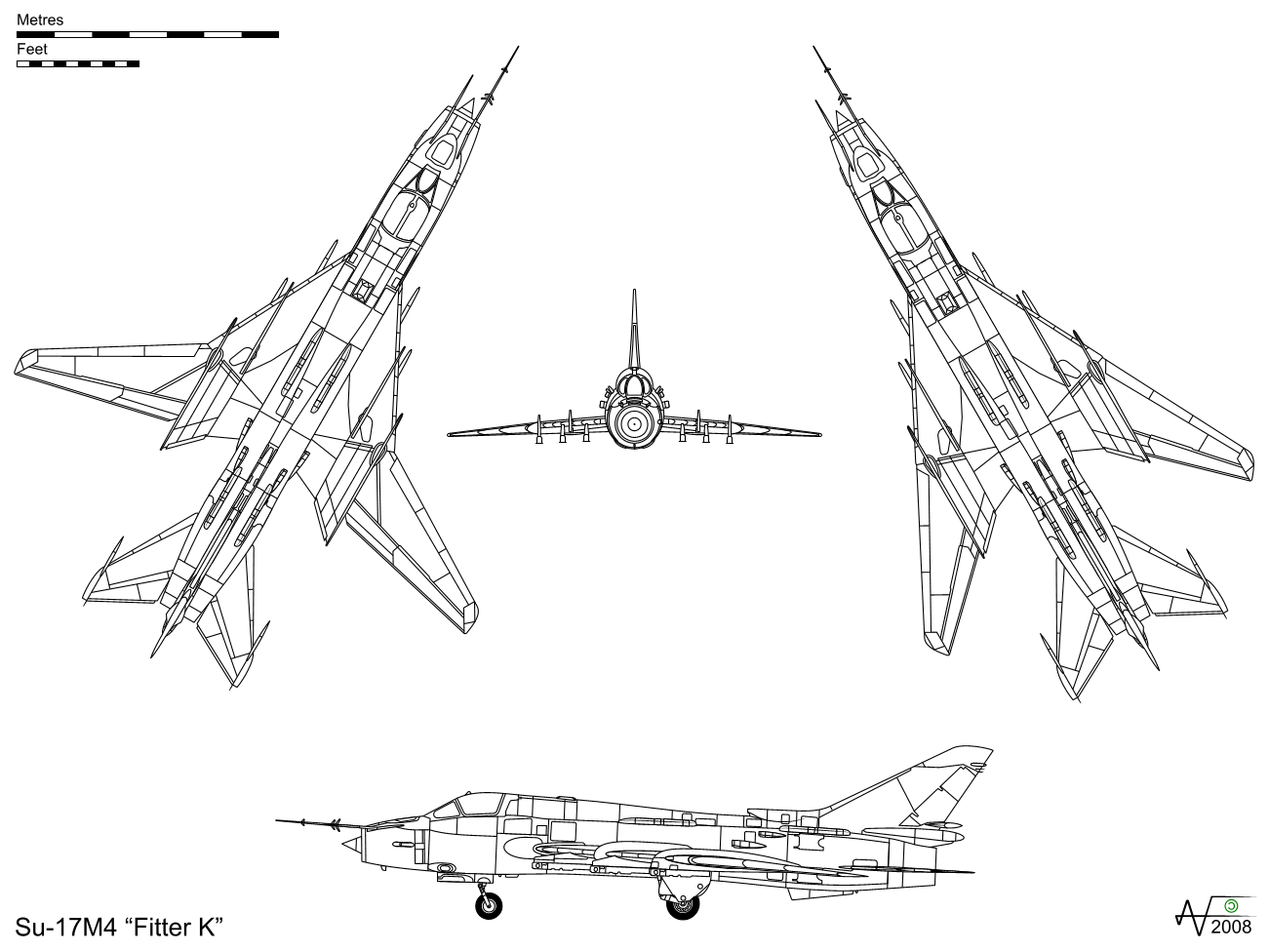 Sukhoi Su-17M4 "Fitter K"